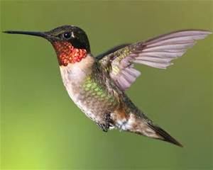 Winter Lecture Series 2016 dhb